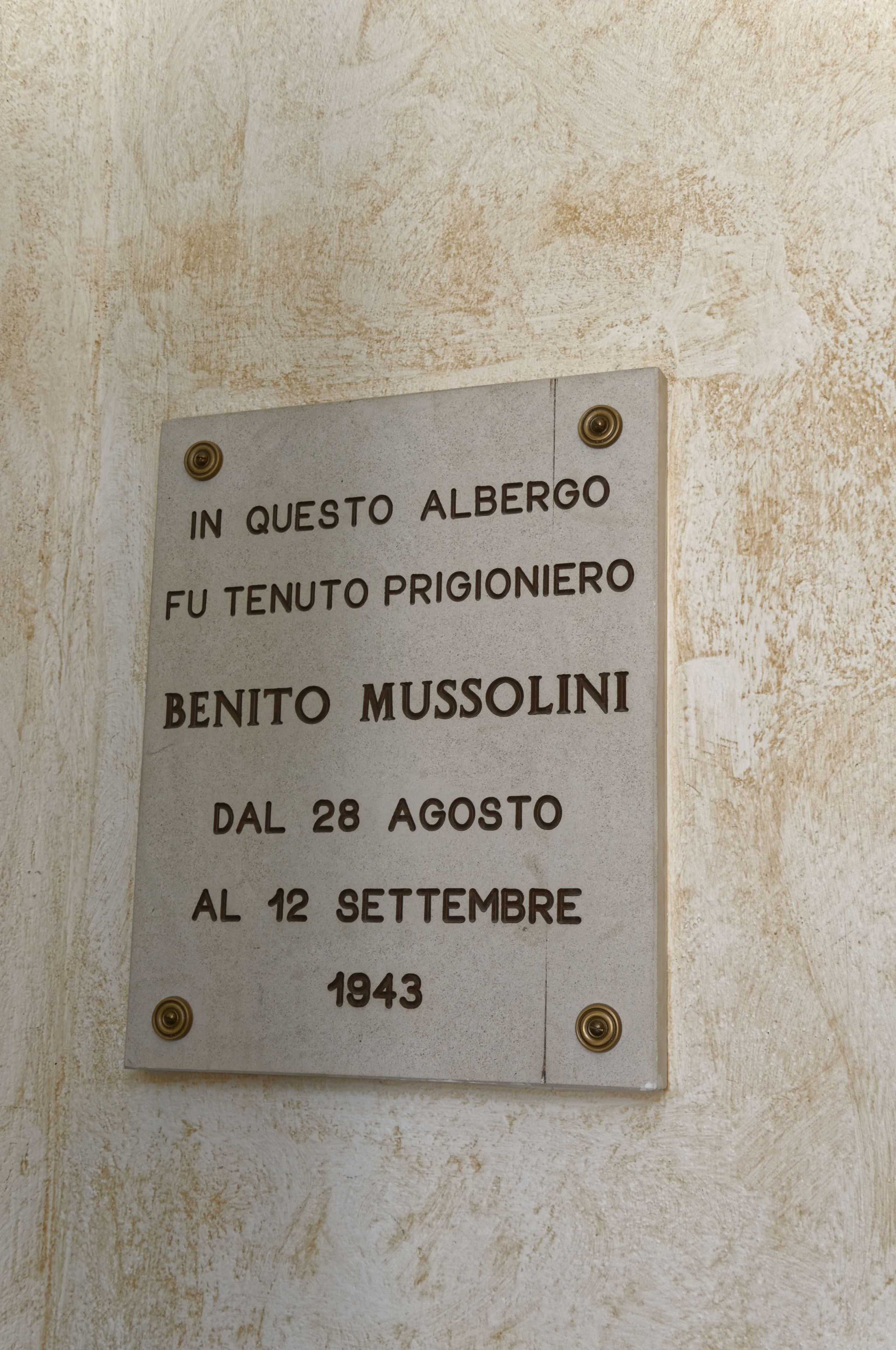 Bilder vom Campo Imperatore 2015